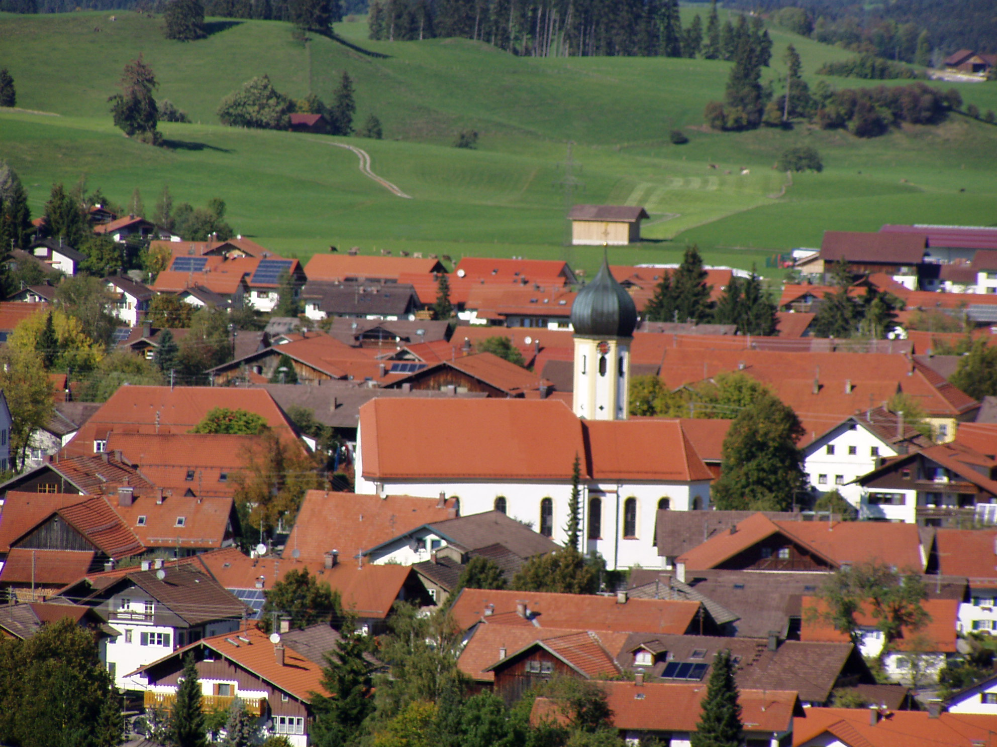 Roßhaupten von Süden